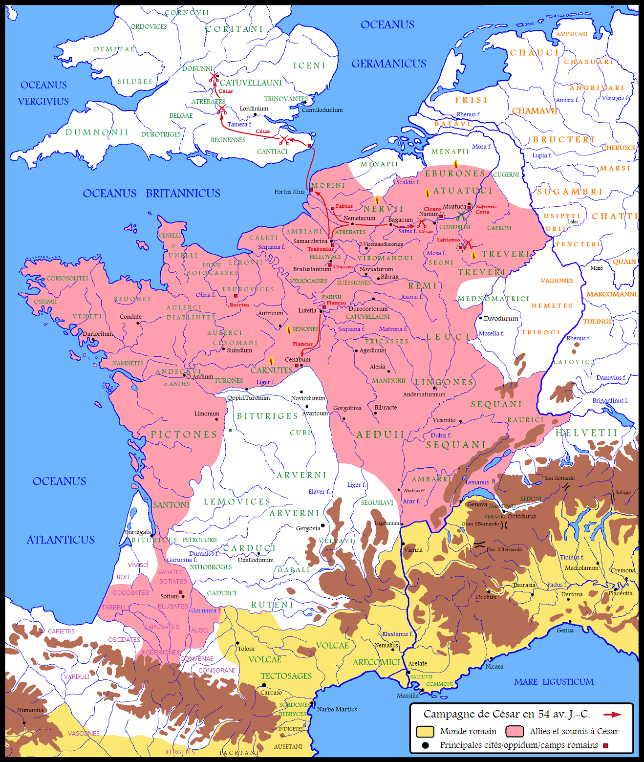 La Gaule en 54 av. J.-C. / Cinquième année de campagne de César